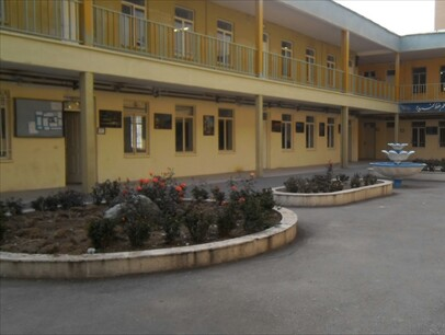 فضایی اموزشی دبیرستان رازی